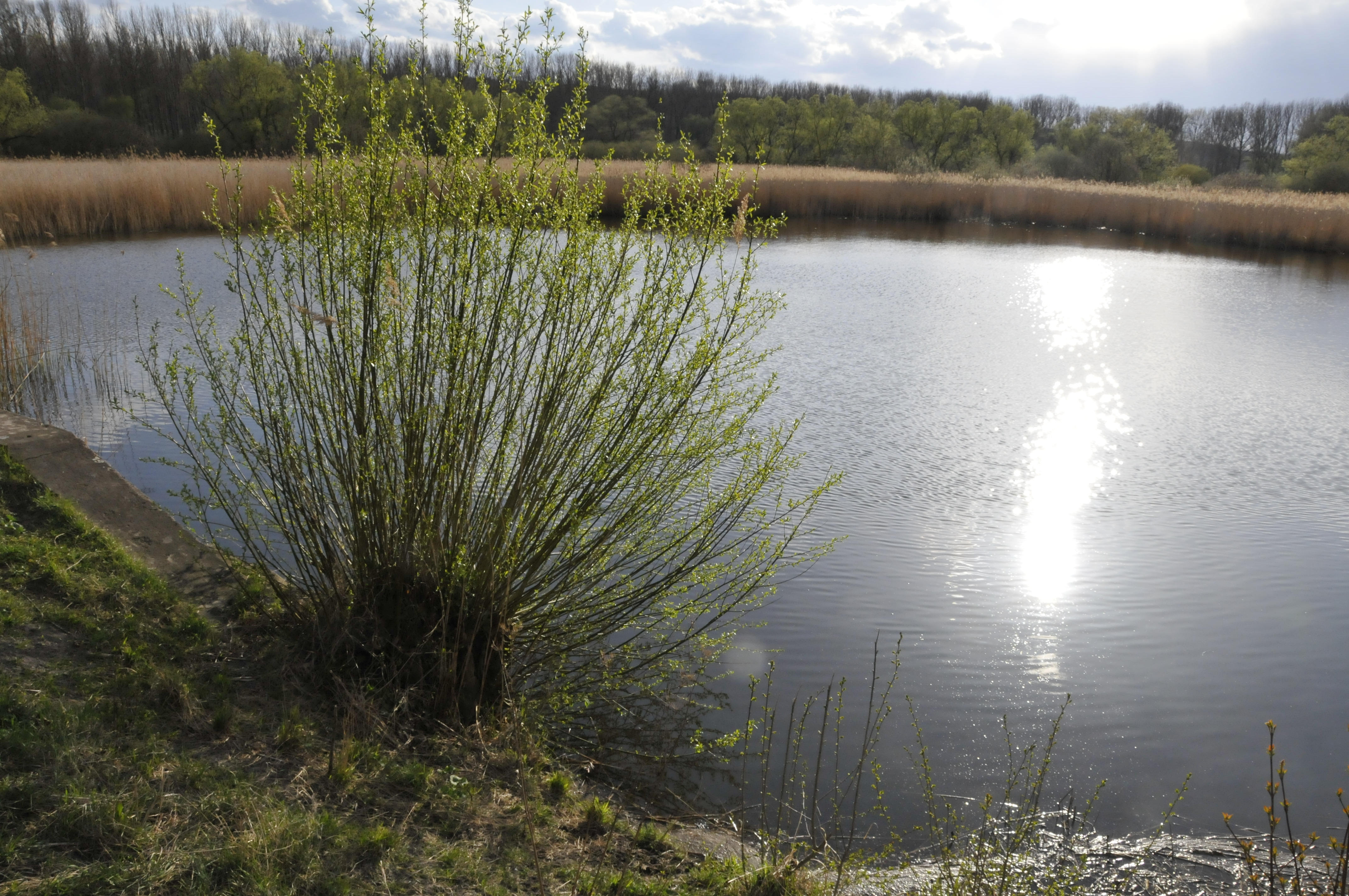 Sieblebener Teich